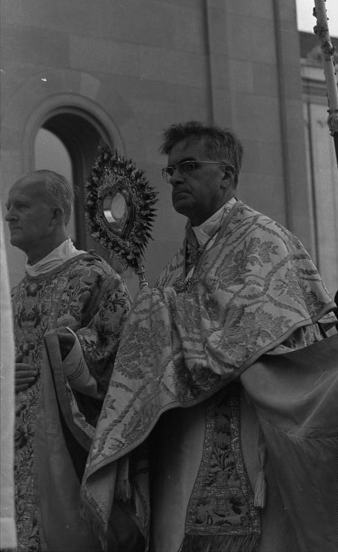 München Fronleichnamsprozession auf der Ludwigstrasse Kardinal Doepfner